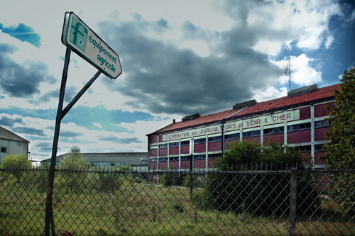 Coopérative des agriculteurs du Loir et Cher (actuellement démoli)